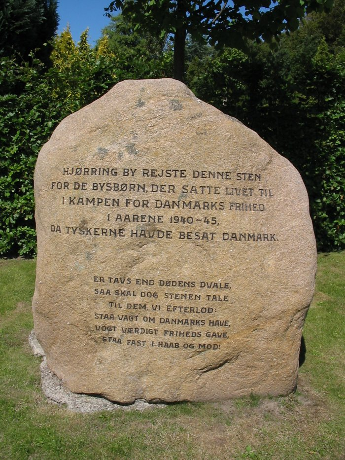 Kamień upamiętniający mieszkańców duńskiego miasta Hjørring, którzy polegli w walce o wolność Danii podczas niemieckiej okupacji w II WŚ.